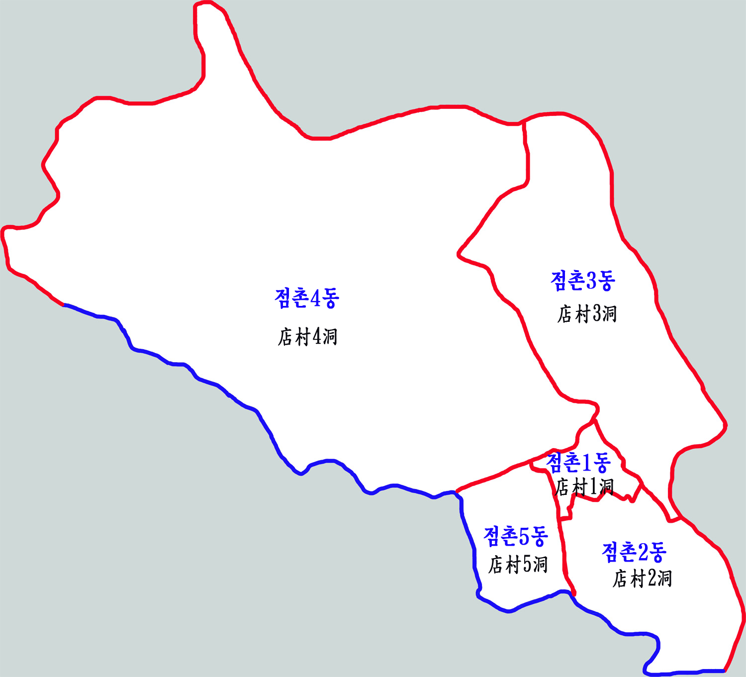 문경시 시내동구역